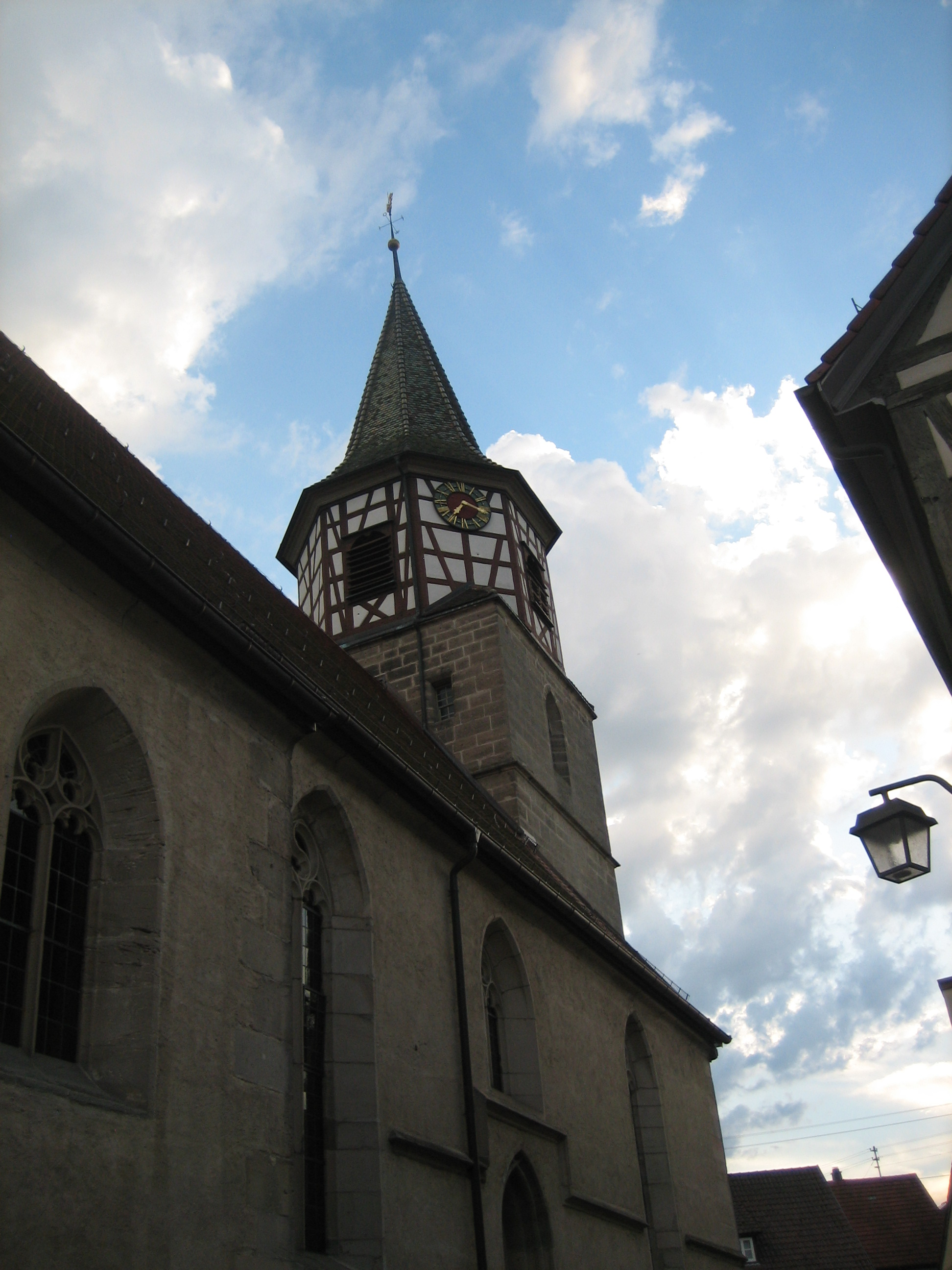 Evangelische Mauritius Kirche Oppelsbohm